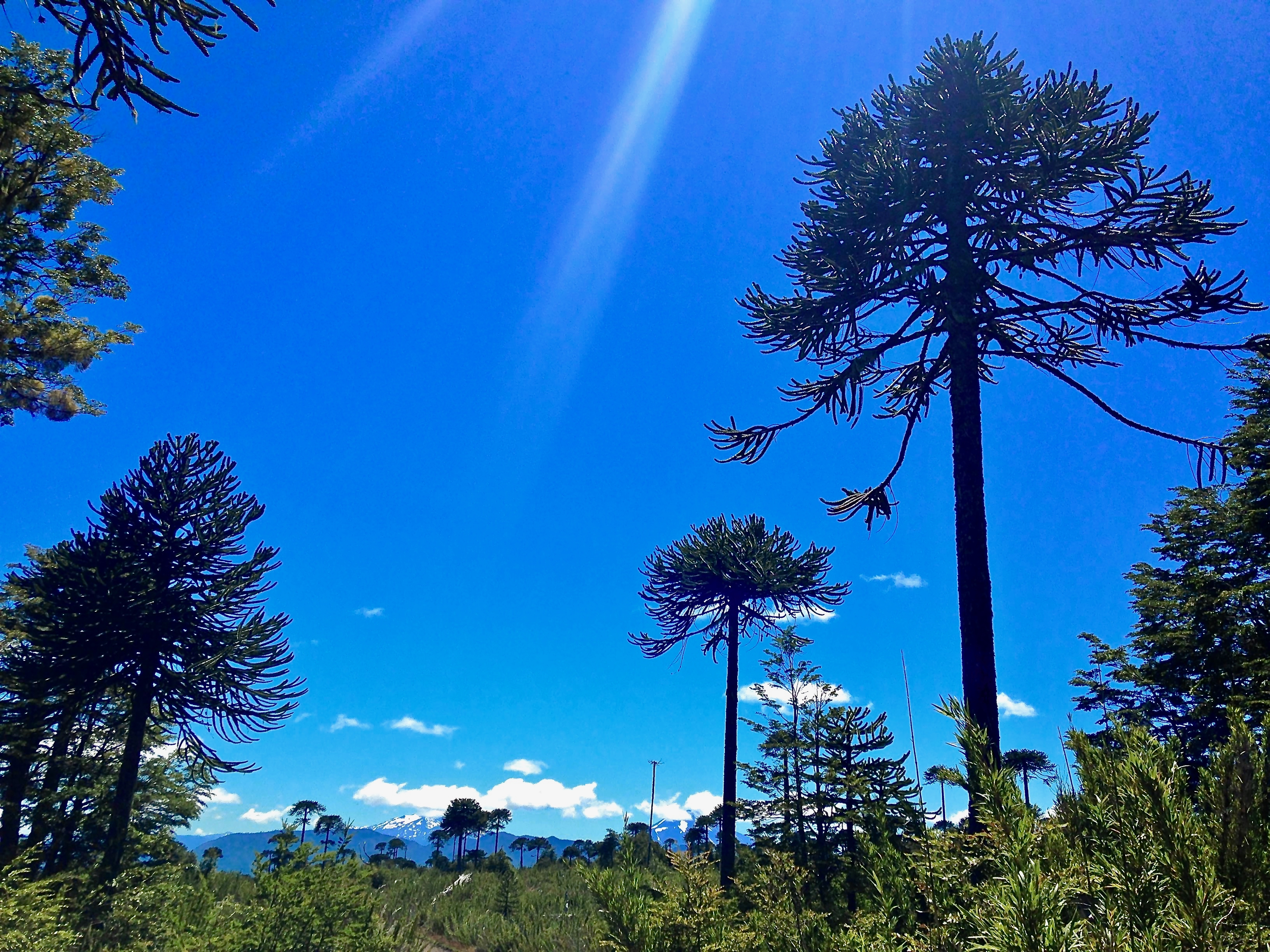 Acceso Sur por Cherquenco al Parque nacional Conguillío